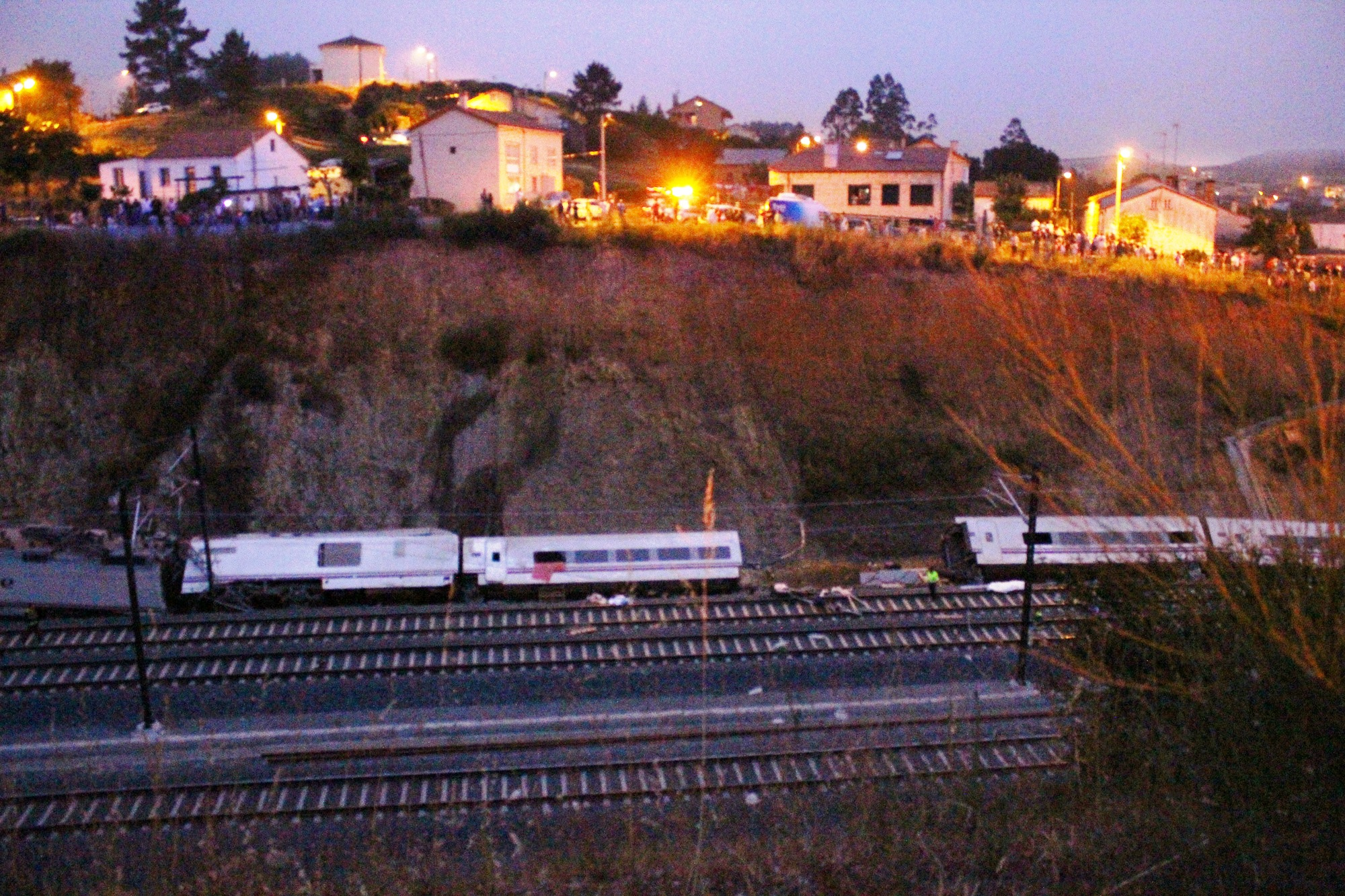 Fotos que hice in situ del accidente ferroviario ocurrido este 24 de julio cerca de Santiago de Compostela. En el momento de escribir estas líneas ya se cuentan 65 muertos. Es el peor accidente ferroviario de España en los últimos 40 años. Tragedy in Santiago de Compostela Photos I made on-site of the train crash on July 24 near Santiago de Compostela. At the time of writing are counted 65 dead. It is the worst rail accident in Spain in the last 40 years.